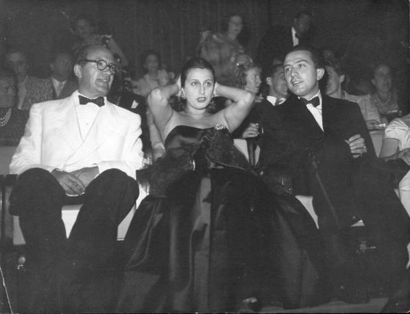 Fotografia che ritrae Giulio Andreotti (a destra nella foto) con Anna Magnani e Giovanni Ponti (a sinistra nell'immagine), nel 1947, in occasione del Festival del cinema di Venezia.